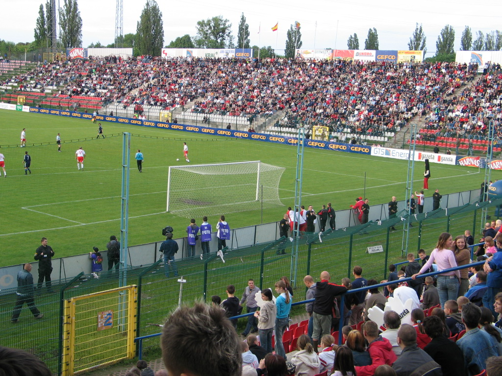 FC Polska : Real Madrid